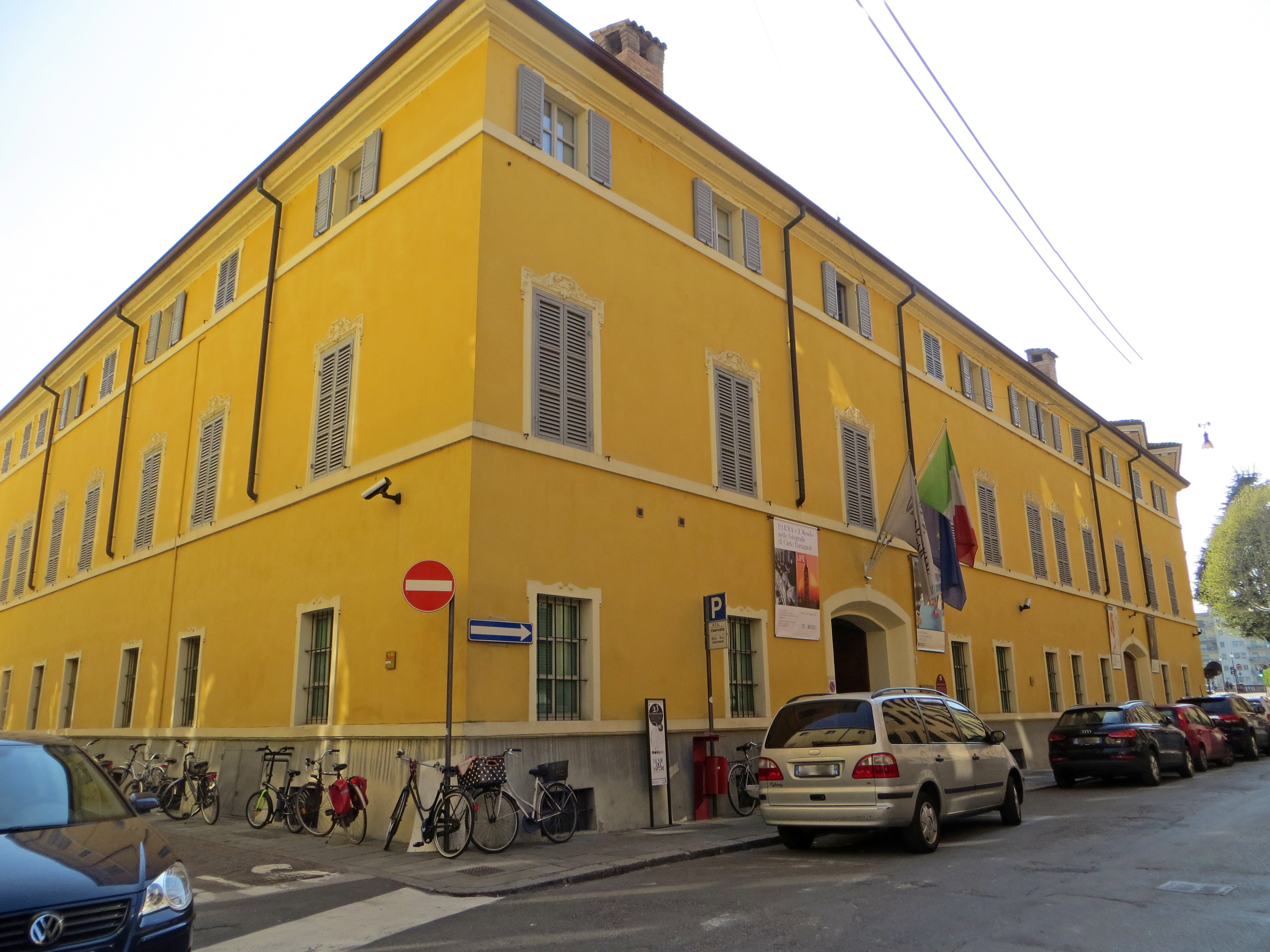 Palazzo Bossi Bocchi - facciata